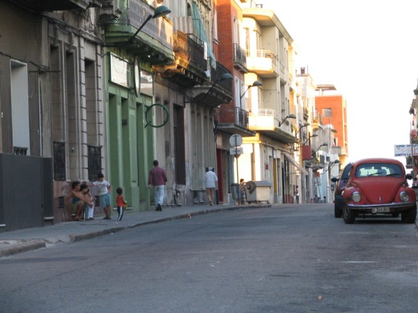 Calle típica de Ciudad Vieja de Montevideo, Uruguay- Imagen tomada el 16 de febrero de 2006 - Cámara Canon Powershot S1 IS - by Chinito.